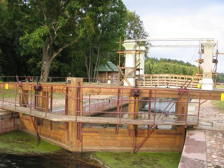 Домбровка, шлюз "Домбровка" Августовского канала